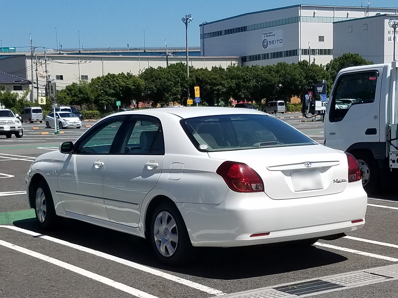 ヴェロッサ エクシード